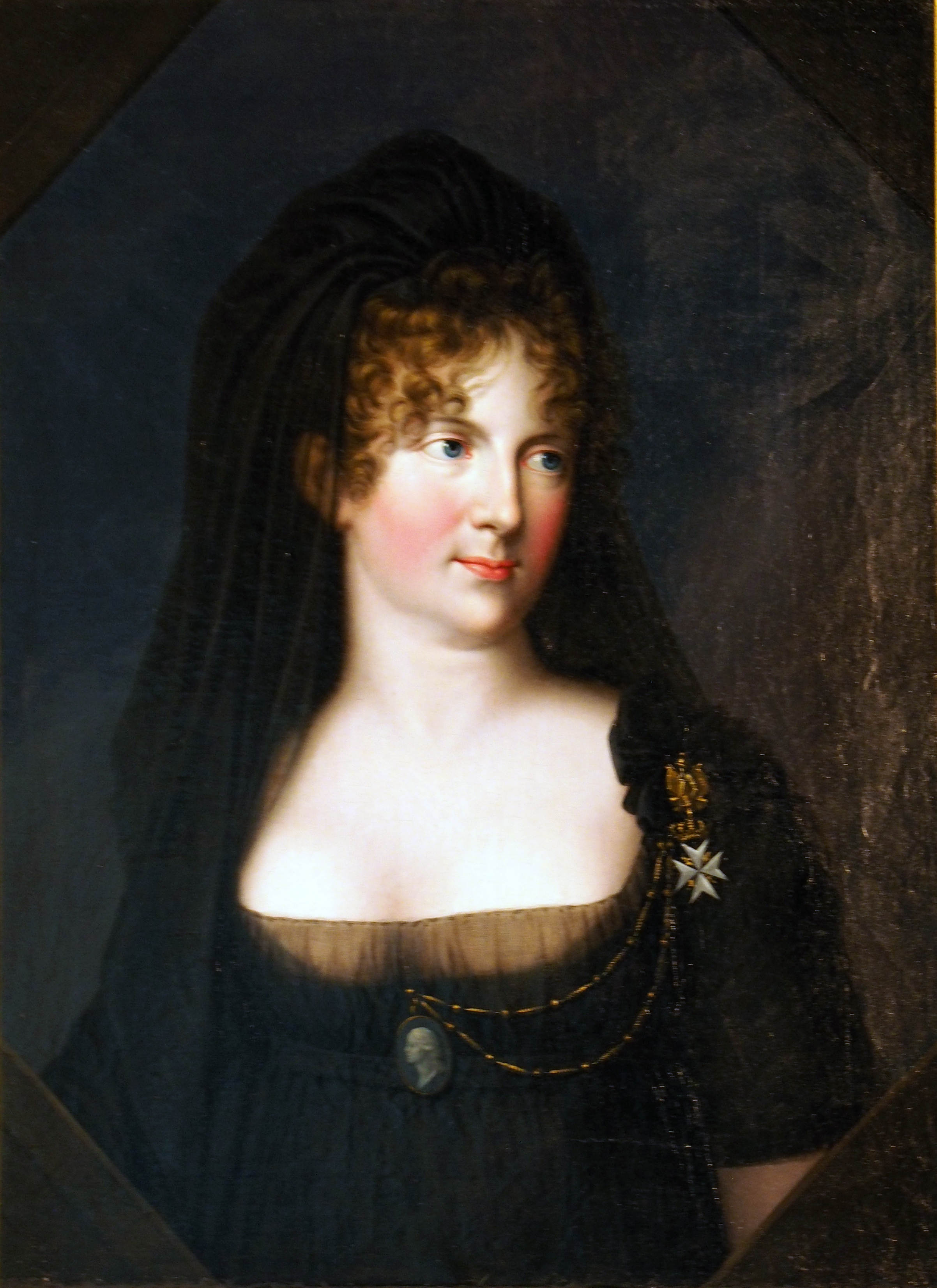 Zarin Maria Feodorowna als Witwe Г. Кюгельхен. Портрет императрицы Марии Федоровны в трауре